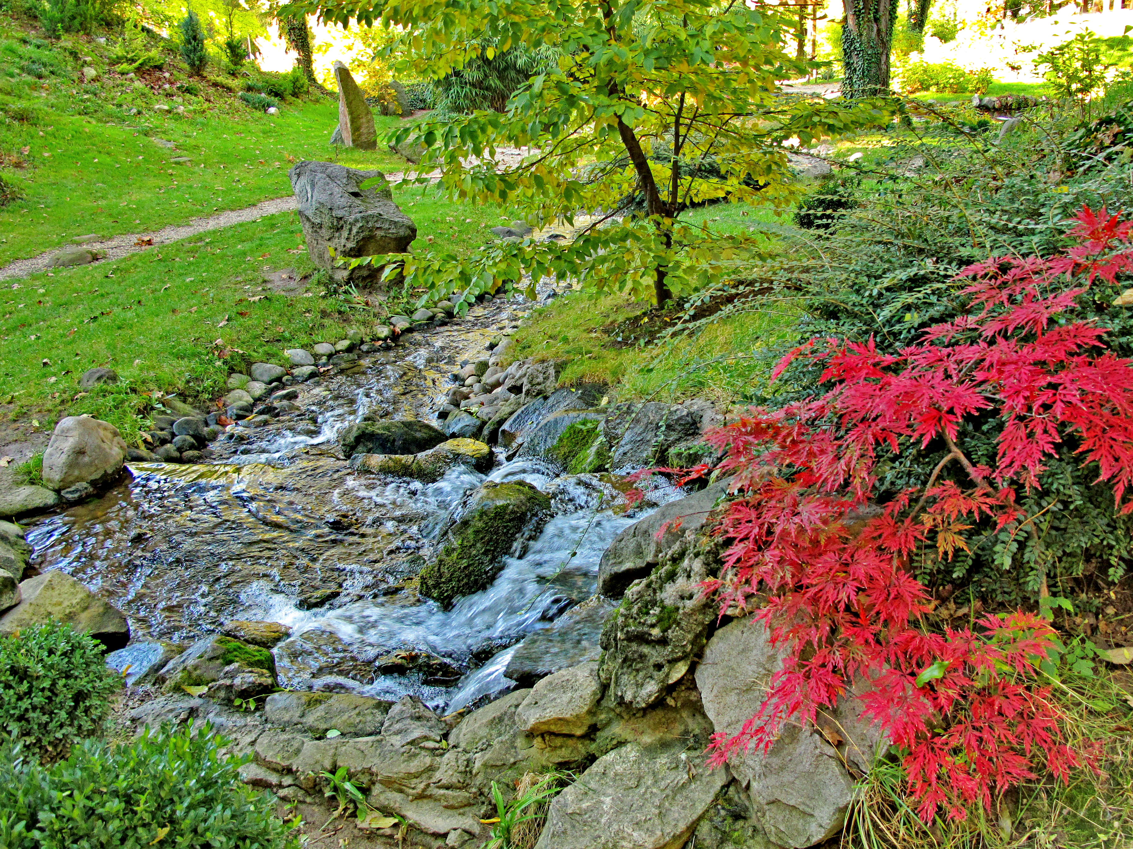 Споменик природе Ботаничка башта Јевремовац